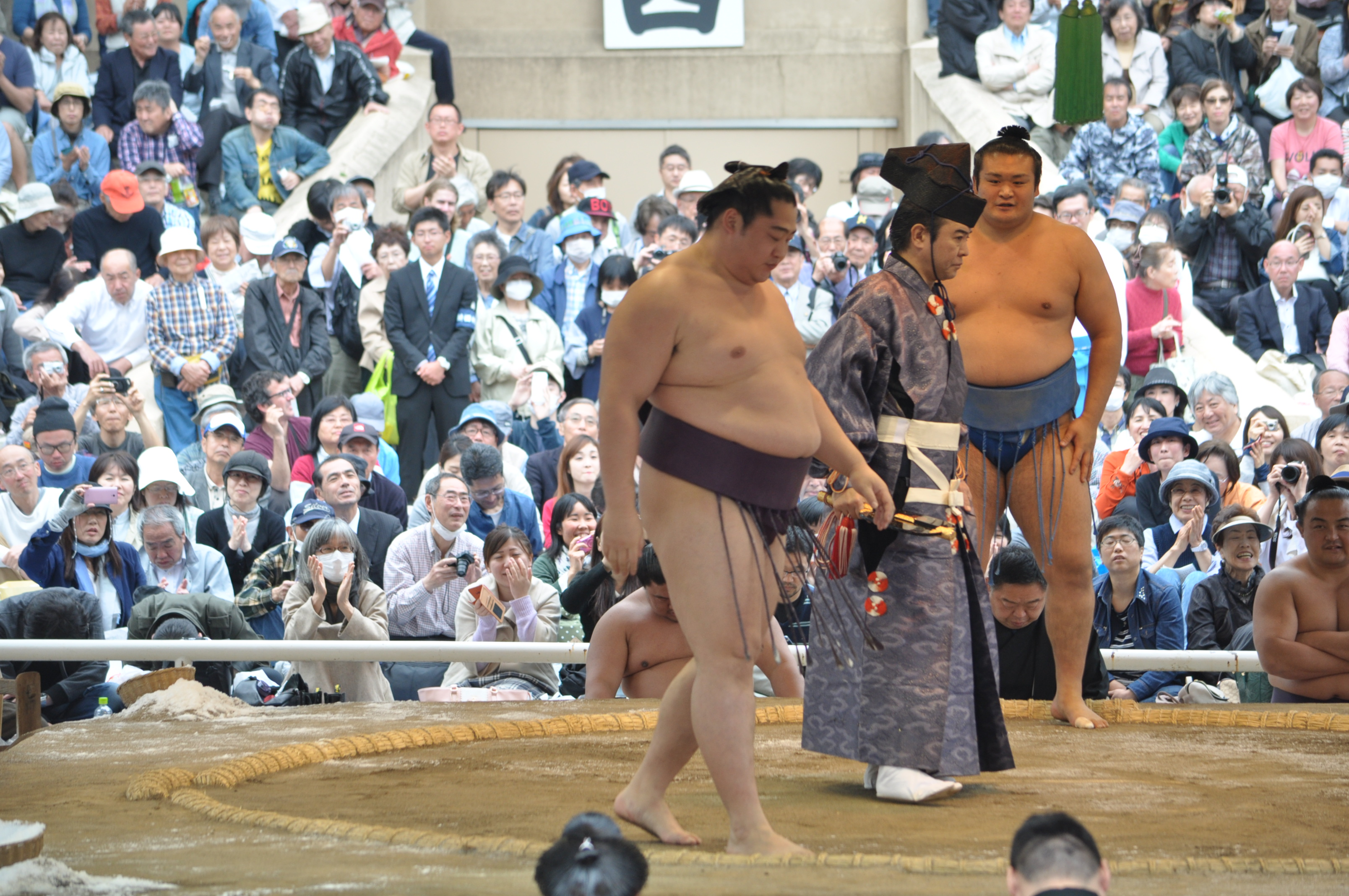 千代の国 憲輝